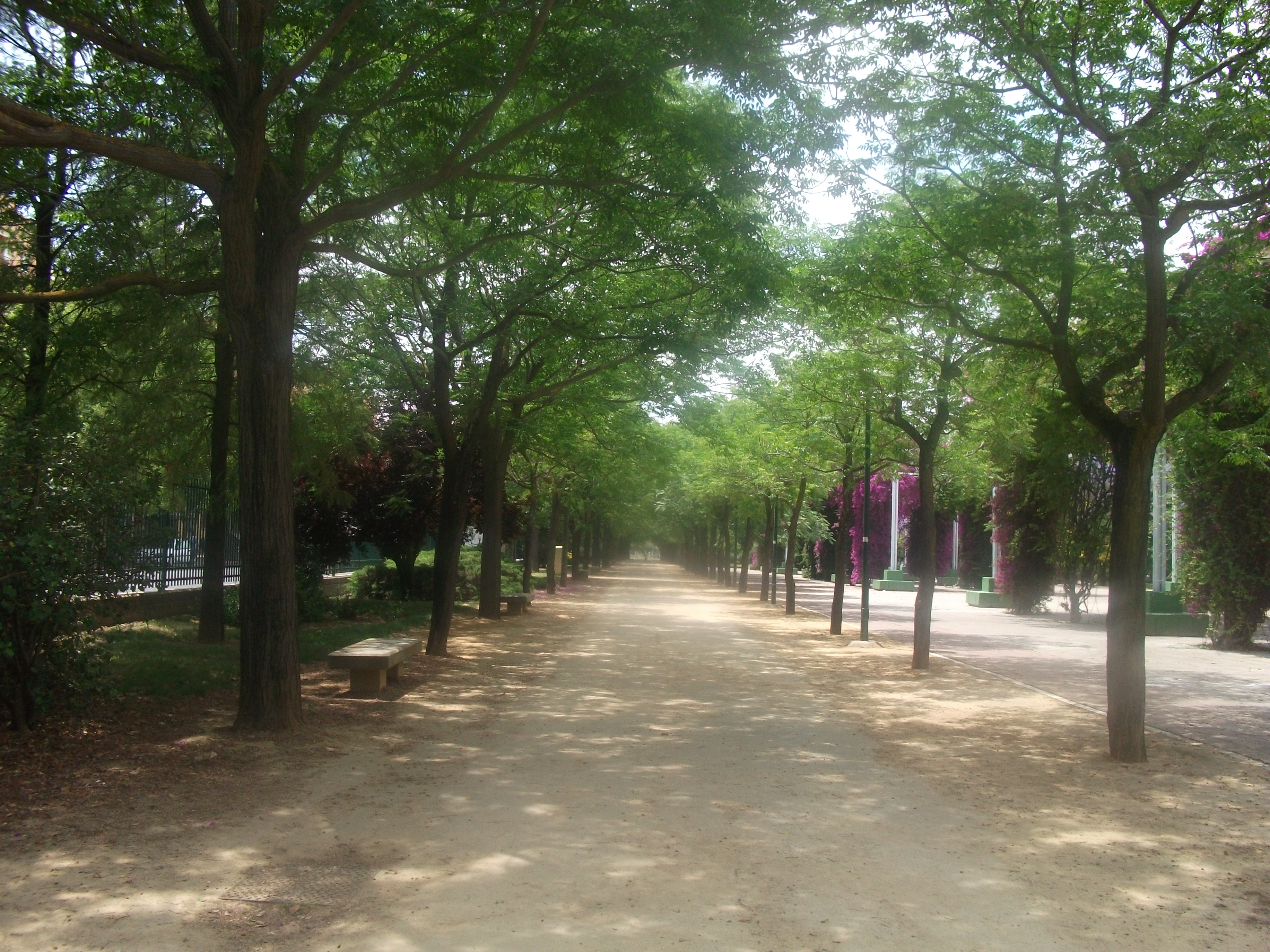 Esto es una de las partes de este parque